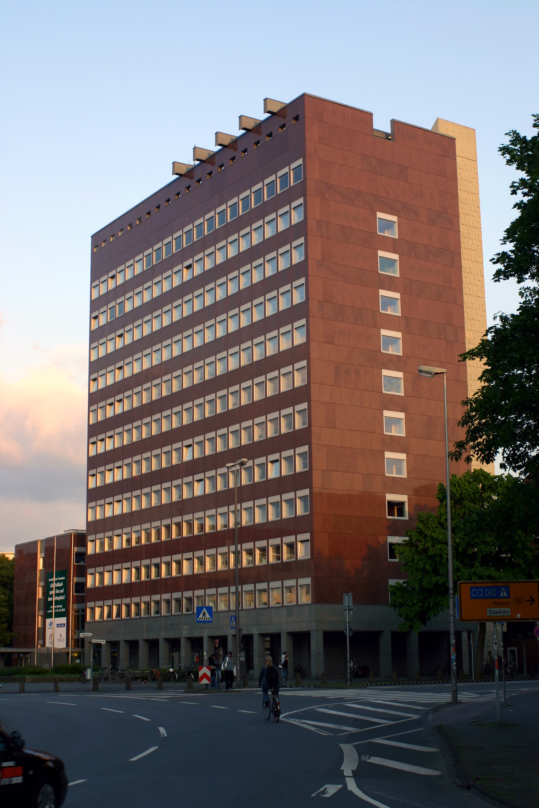 Stadthaus 2 am Ludgeriplatz